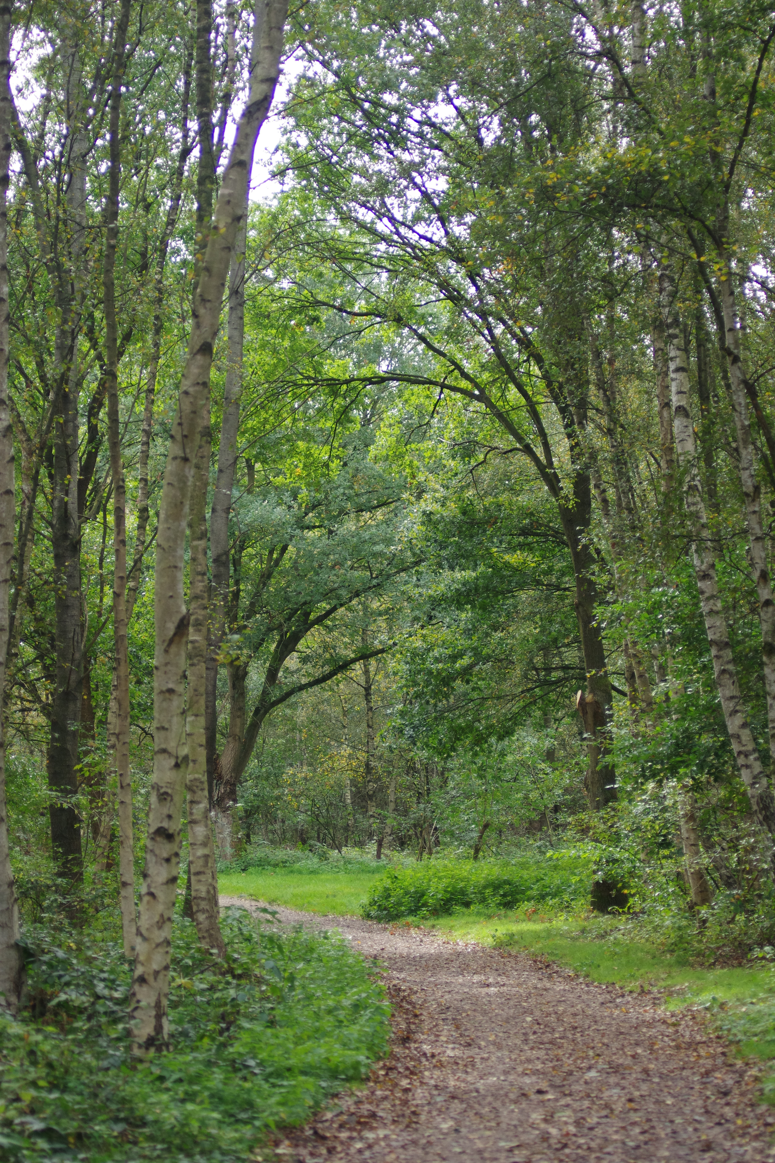 Waldweg im Landschaftsschutzgebiet Maschener Moor.